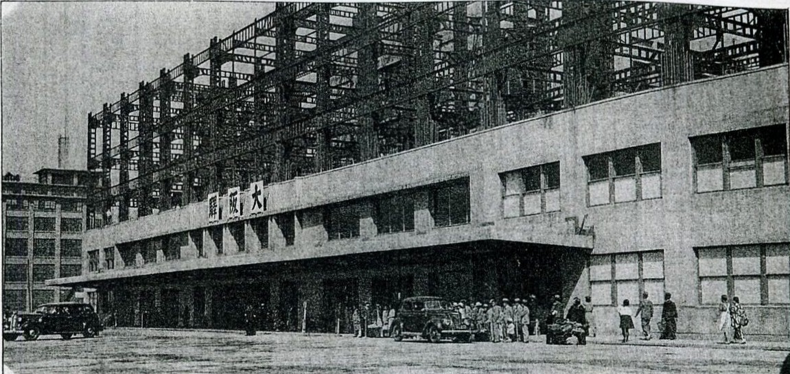 1940年(昭和15年)6月1日、3代目大阪駅は鉄骨が突き出した未完成状態のまま開業した。